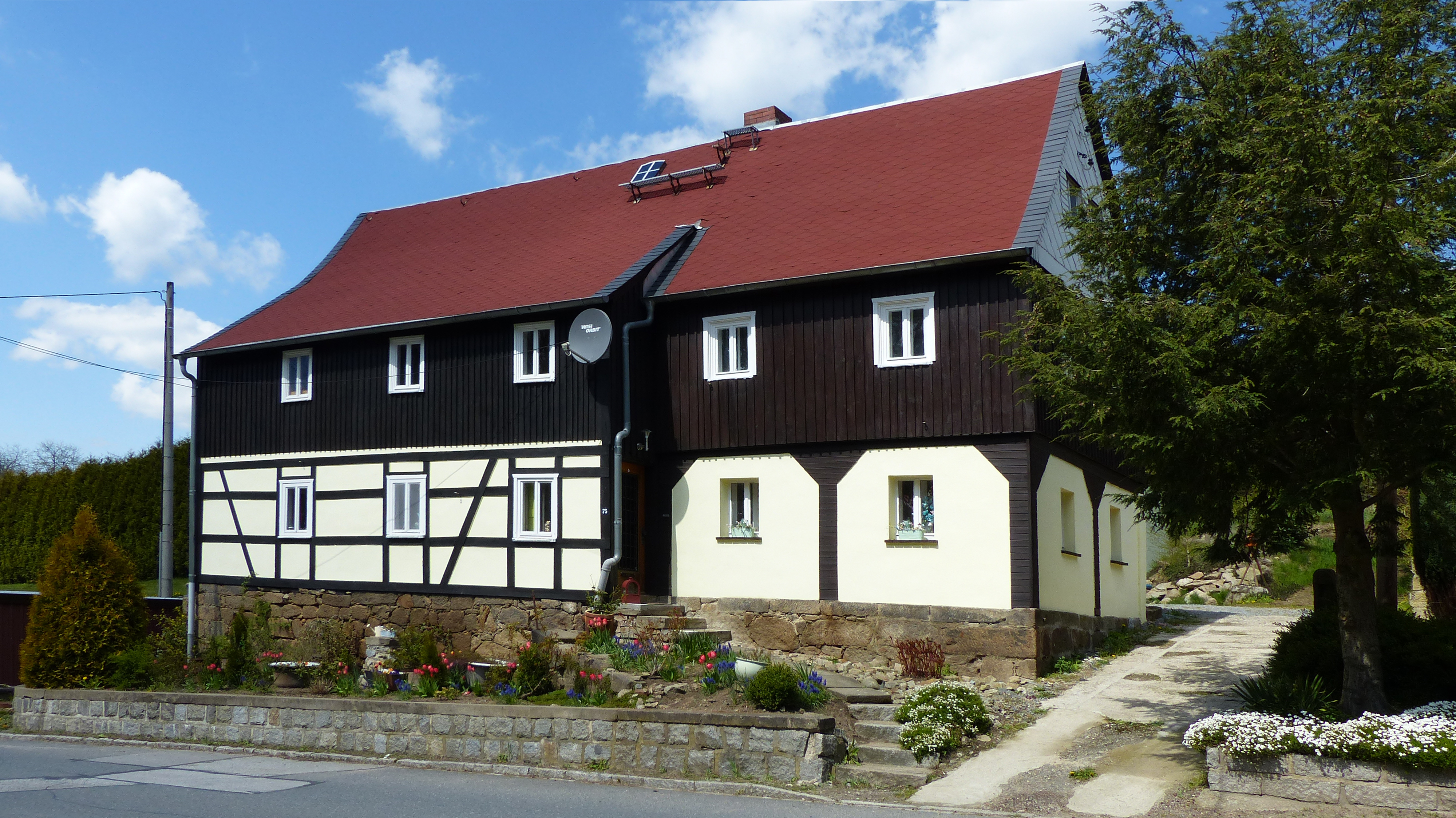 Denkmalgeschütztes Umgebindehaus, Hertigswalde 75, Hertigswalde (Sebnitz)